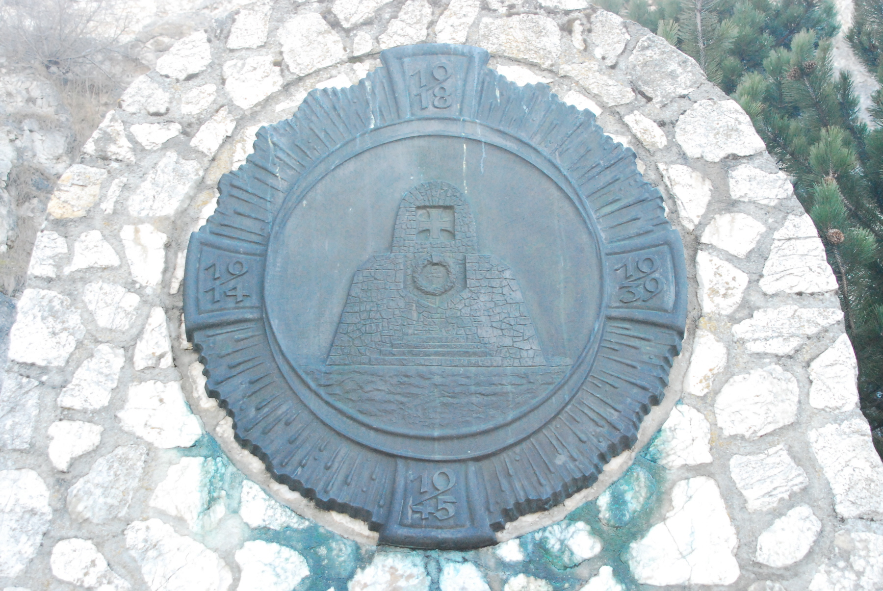 Relief mit der Darstellung des 1925 in Klentnitz errichteten und 1945 zerstörten Südmährischen Kriegerdenkmals auf dem Schweinbarther Berg in Kleinschweinbarth in Niederösterreich